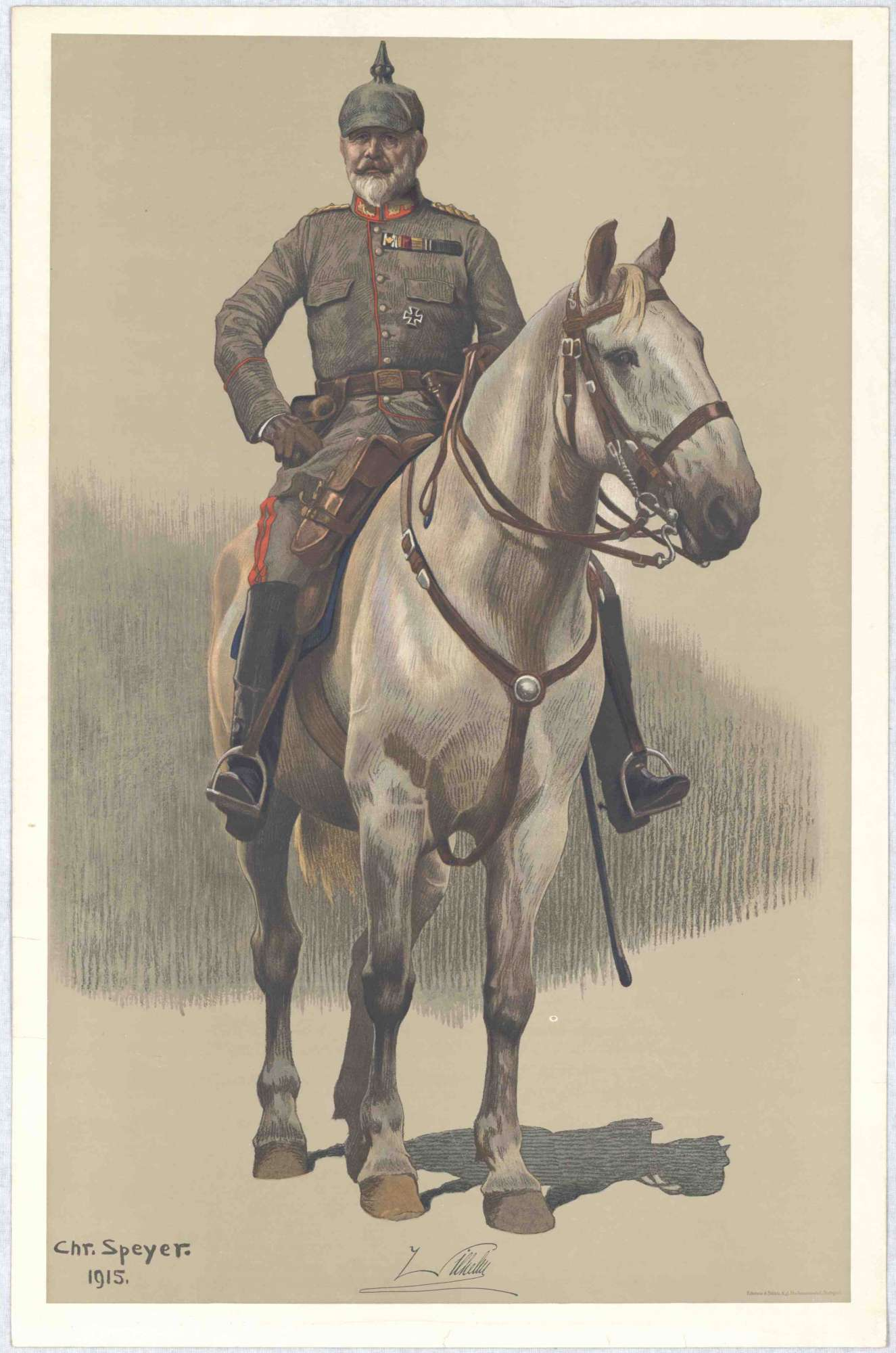 König Wilhelm II. von Württemberg in Felduniform mit Orden, Helm, zu Pferd